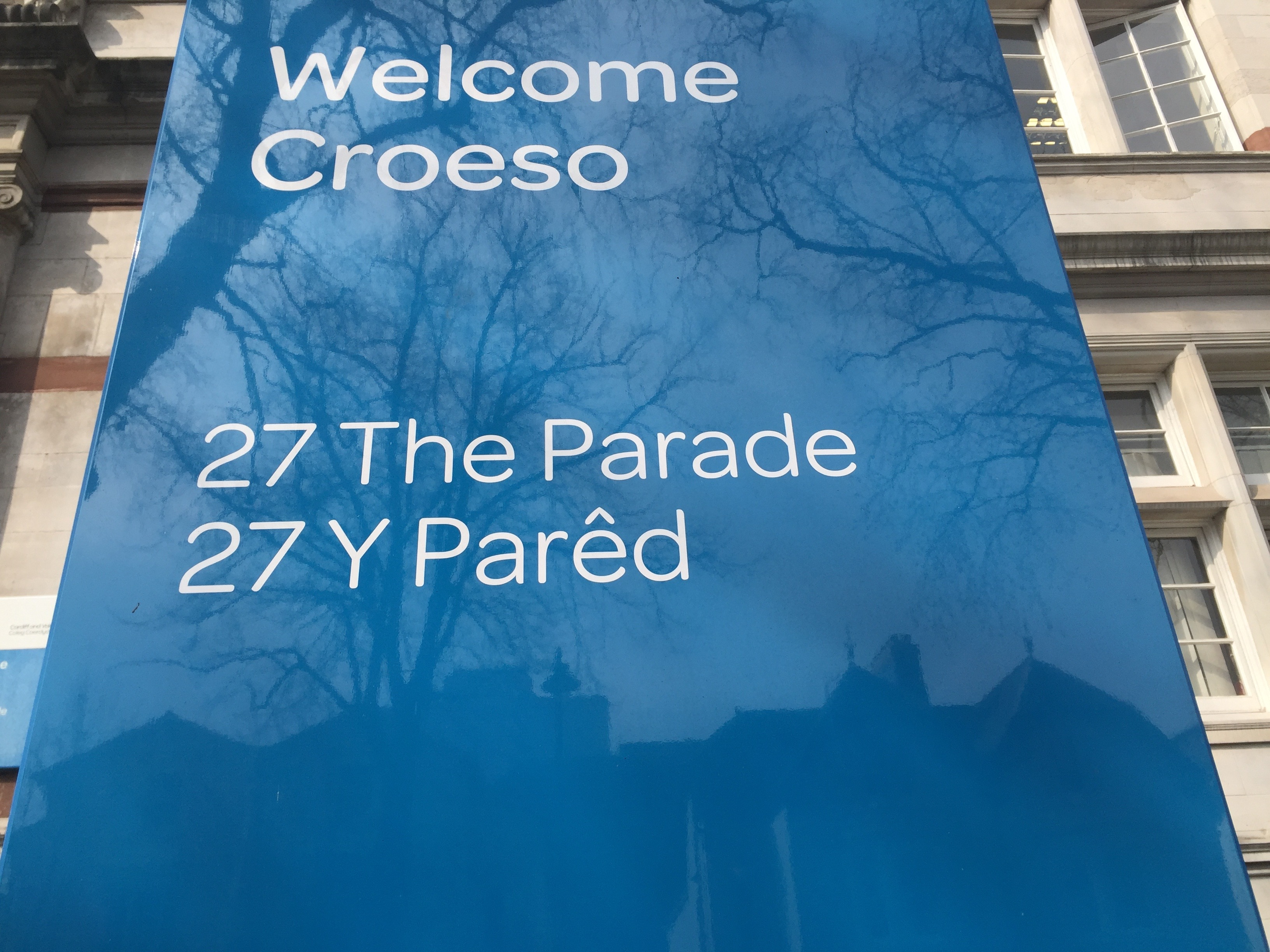 Arwydd dwyieithog y tu allan i Goleg Caerdydd a'r Fro: Welcome / Croeso / 27 The Parade / 27 Y Parêd